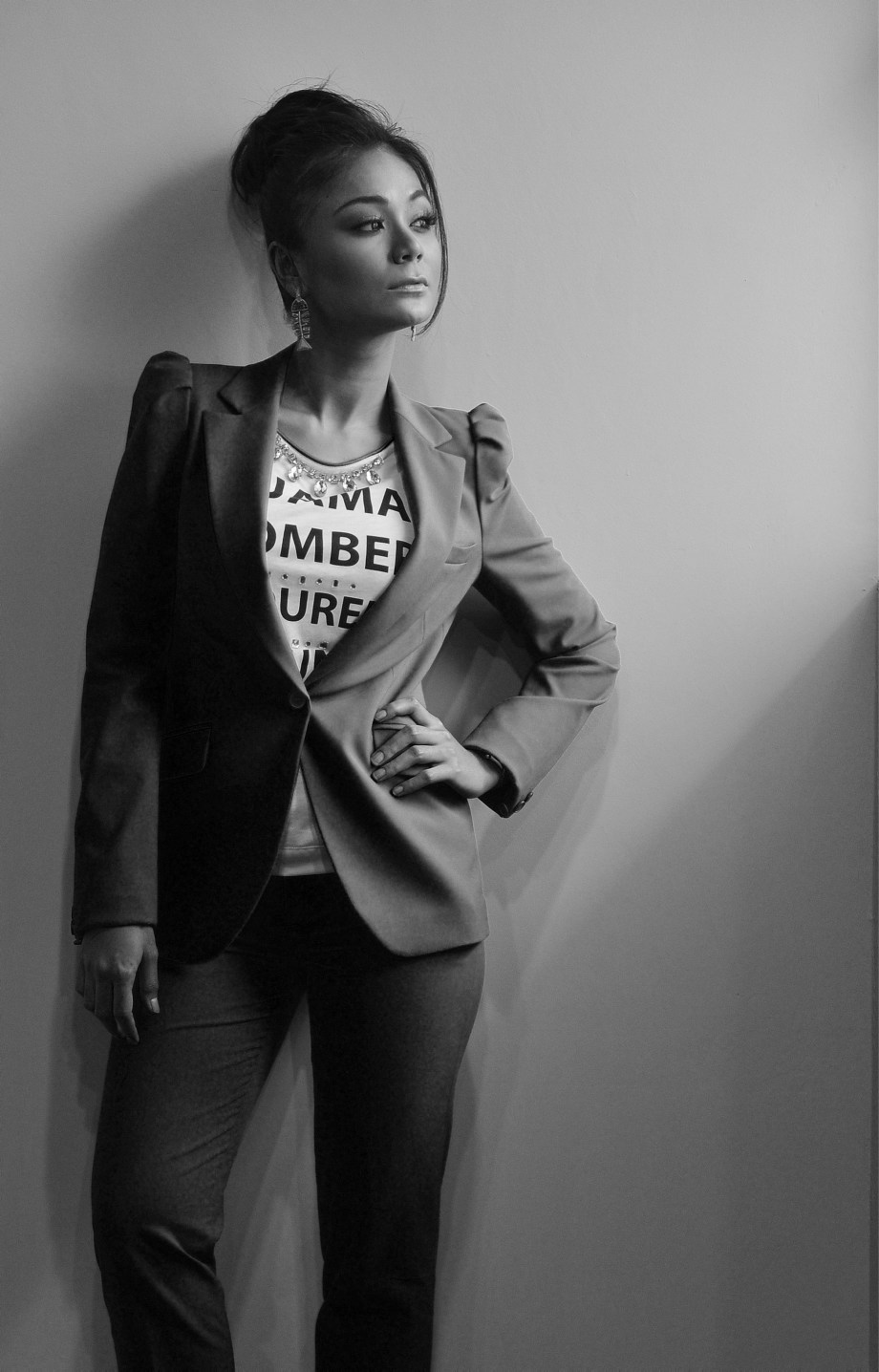 Tasha Shilla